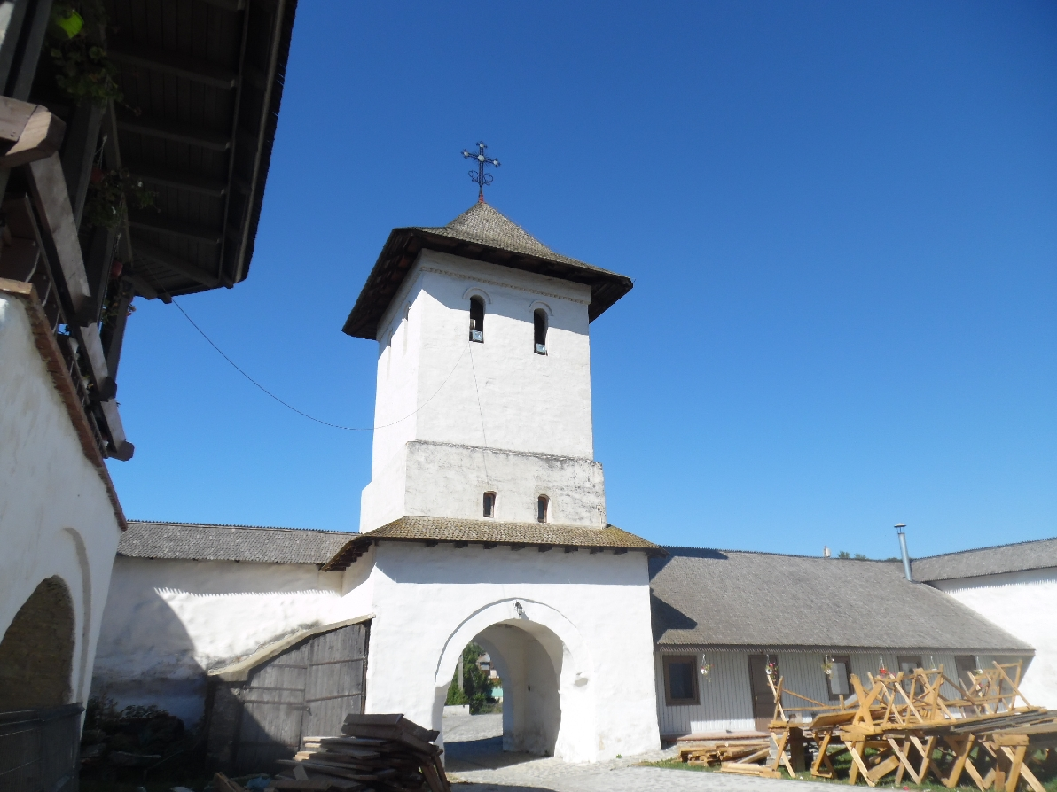 Manastirea Apostolache 2015